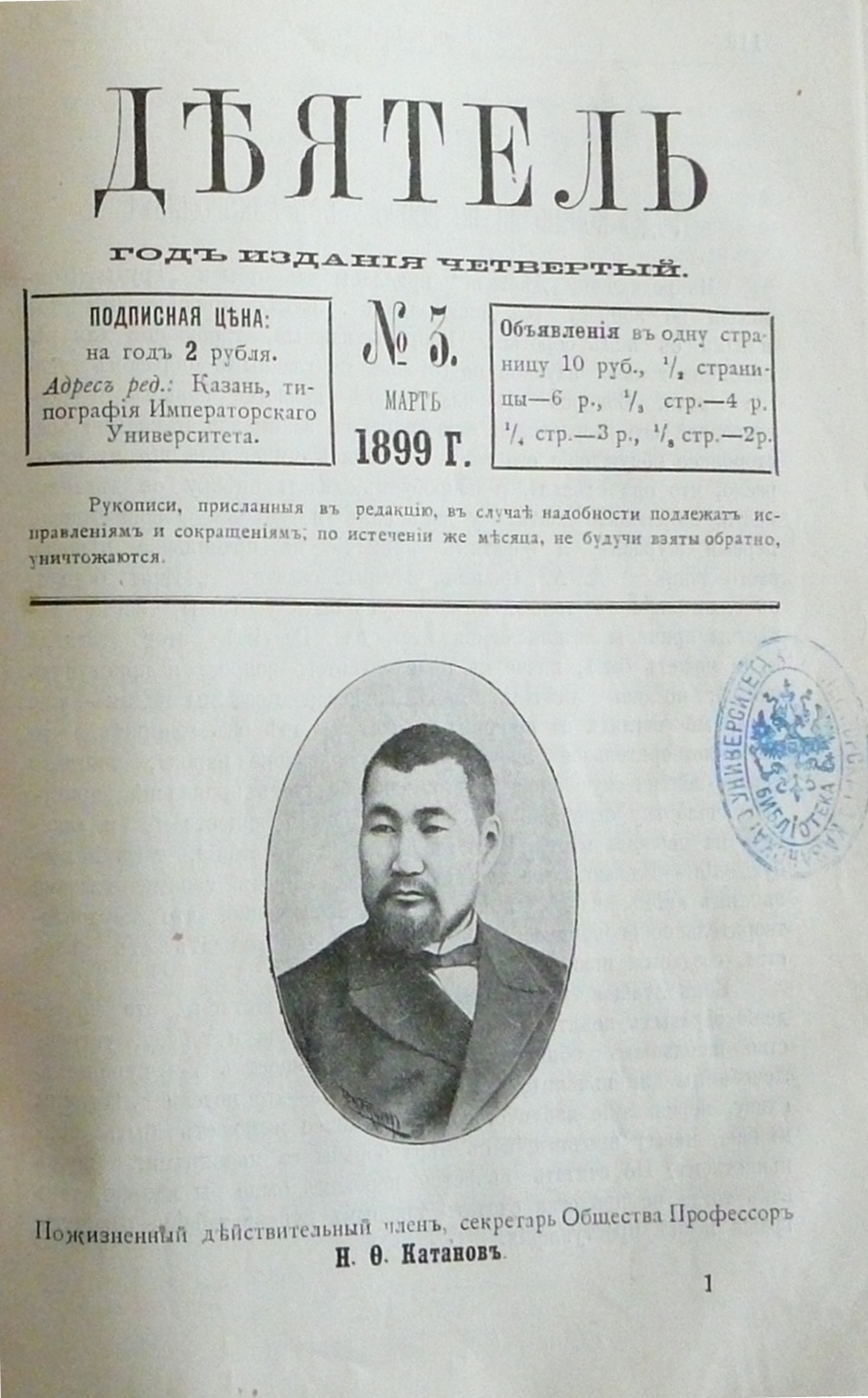 Внутренняя обложка журнала «Деятель» (№ 5 за март 1899 г.) с фотопортретом профессора Николая Фёдоровича Катанова.